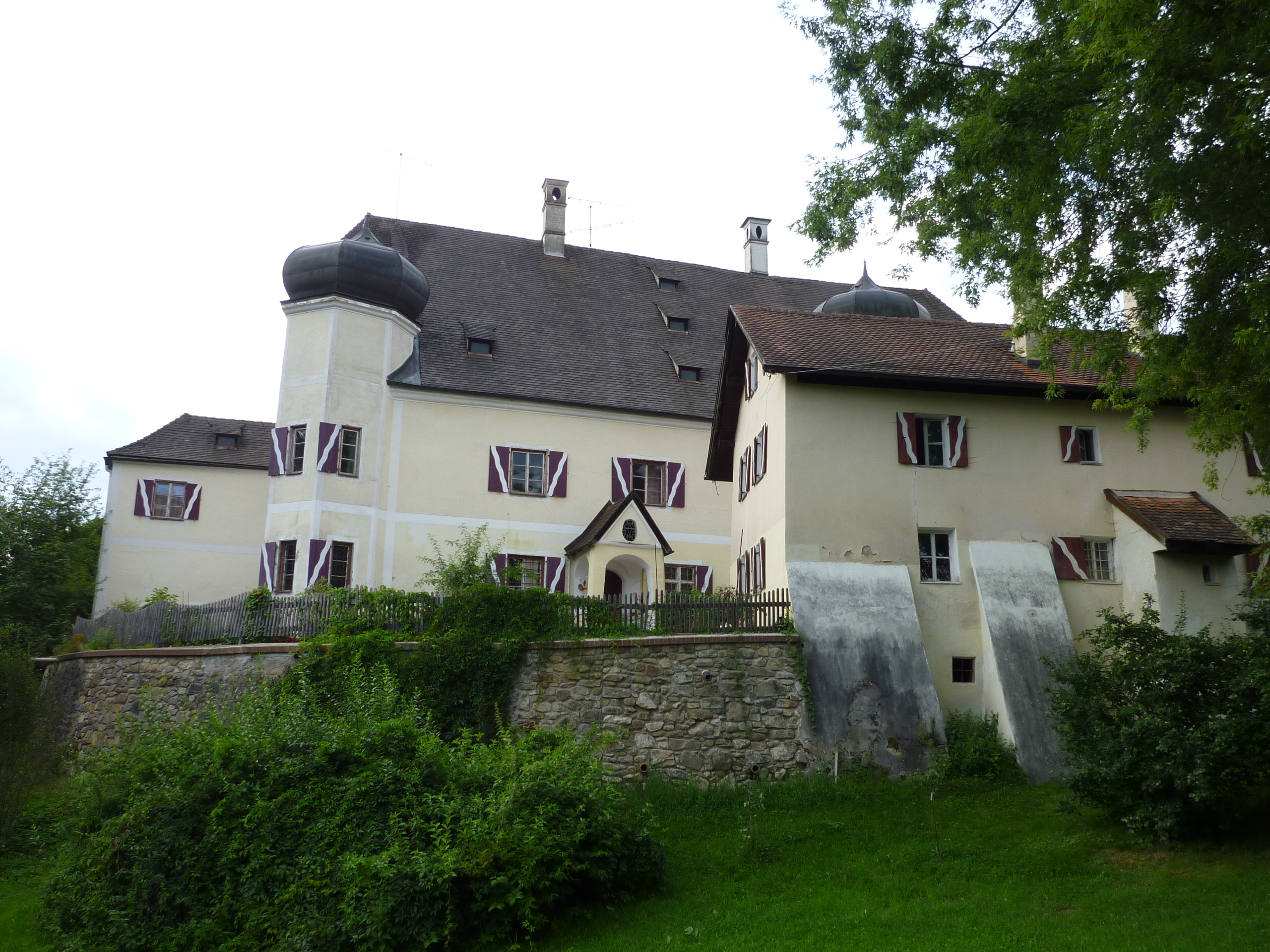 Das Schloss Haggn bei Neukirchen ist eine ehemalige Wasserburg; Wohnbau über älterem Kern im 17. Jahrhundert errichtet; mit Ecktürmen, Anbauten und Walmdach. Liste der Baudenkmäler in Neukirchen.